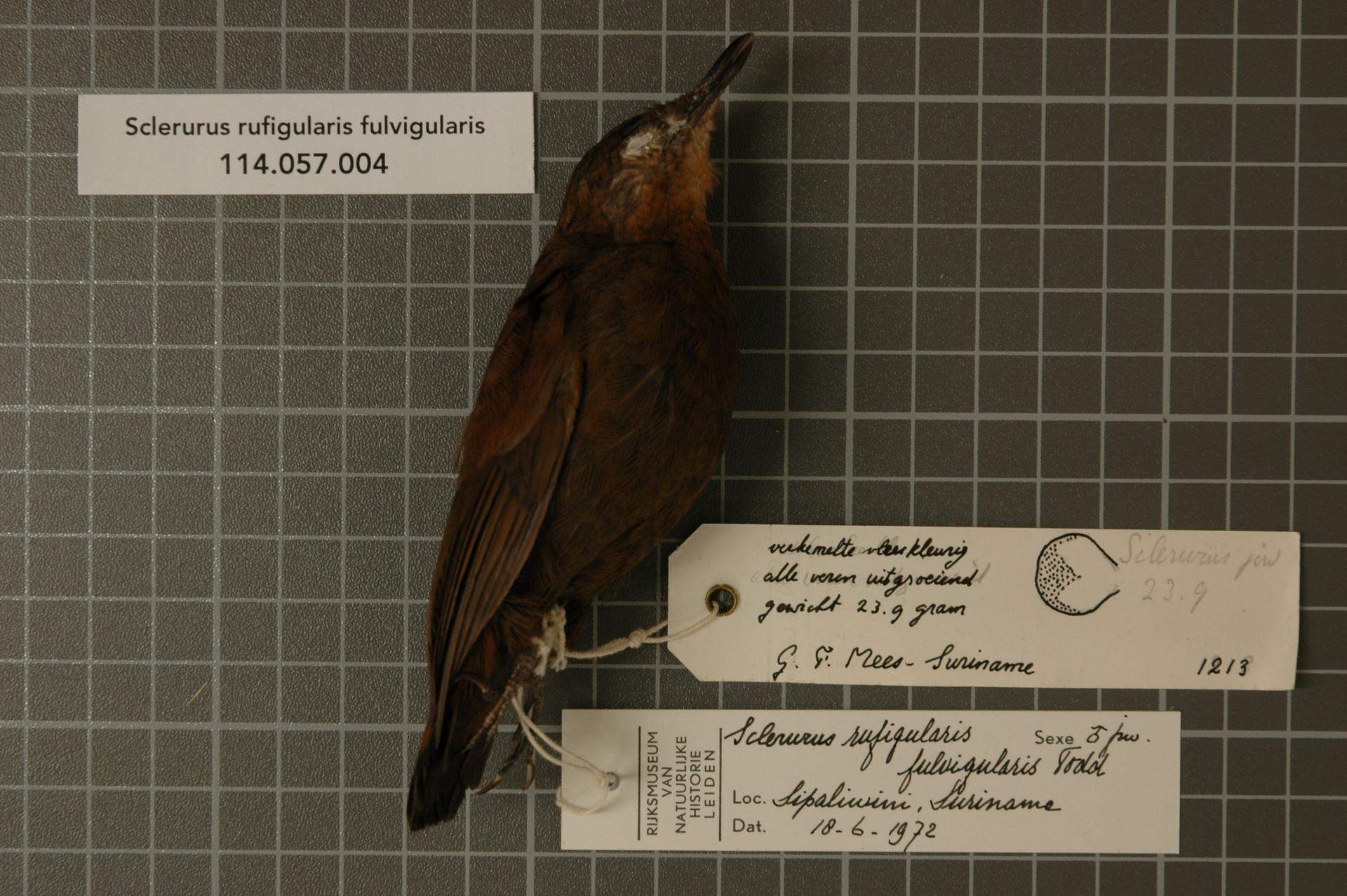 Sclerurus rufigularis fulvigularis Todd, 1920